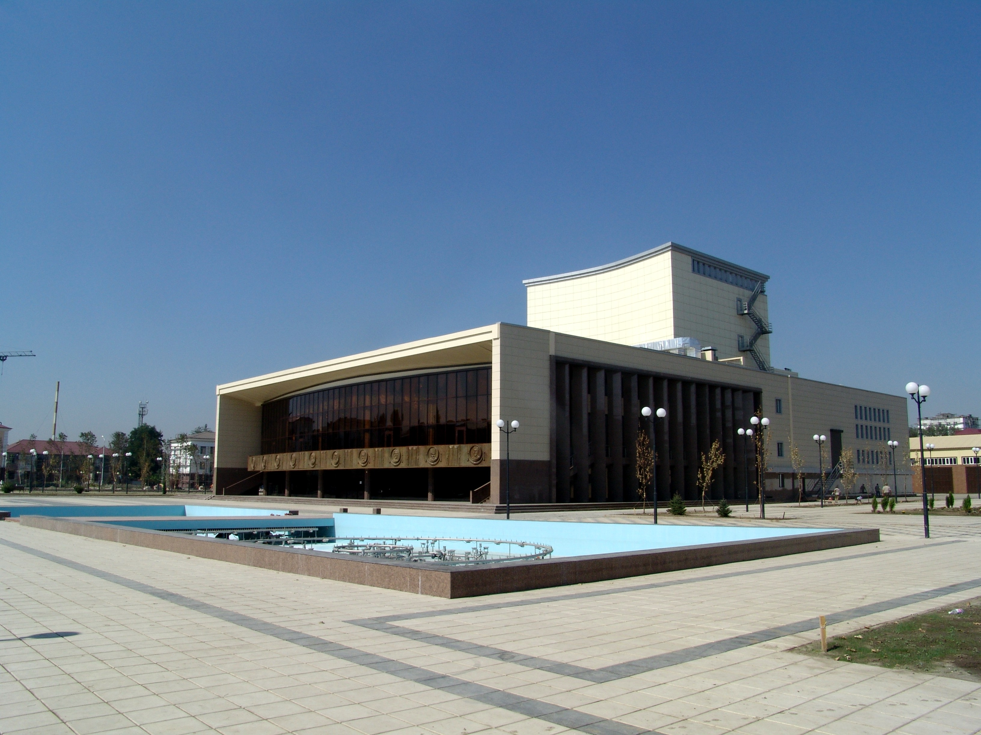 Грозненский театрально-концертный зал